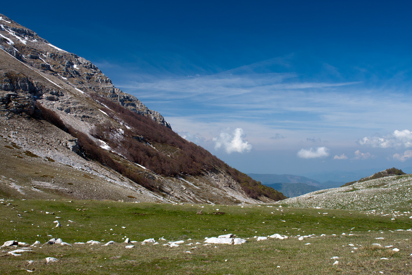 Vallone del Cieco - Riserva Naturale Montagne della Duchessa (RI)